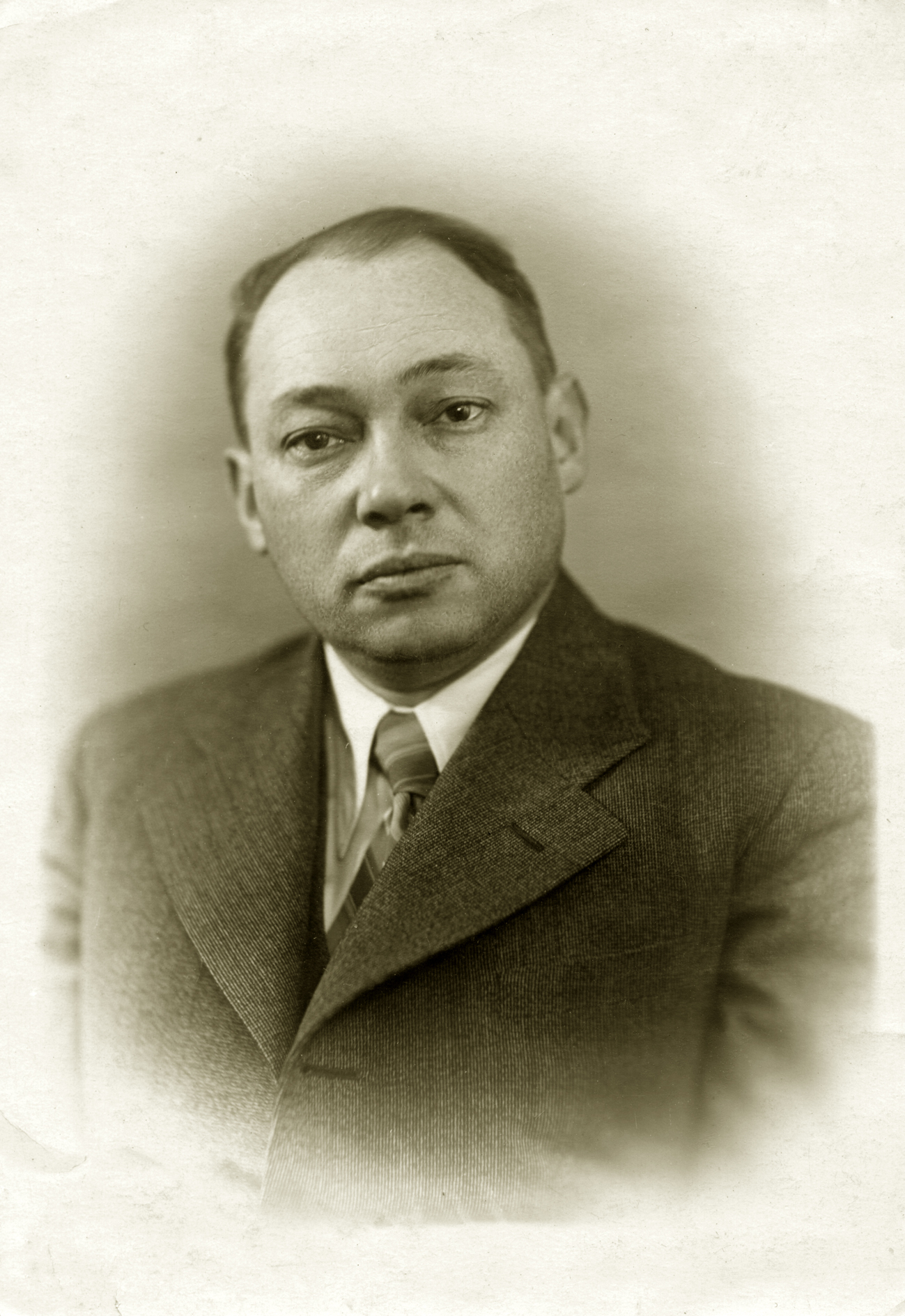 Профессор ЛПМИ Эммануил Иосифович Фридман